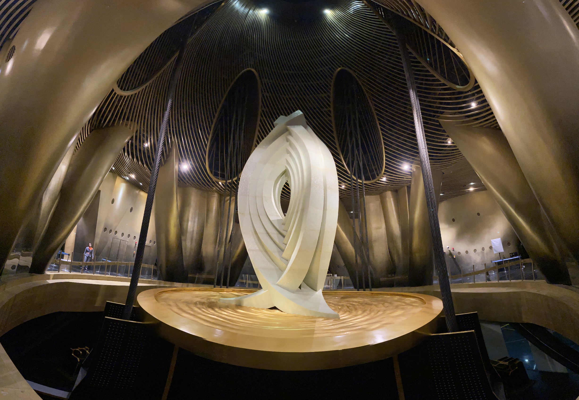 上海中心阻尼器